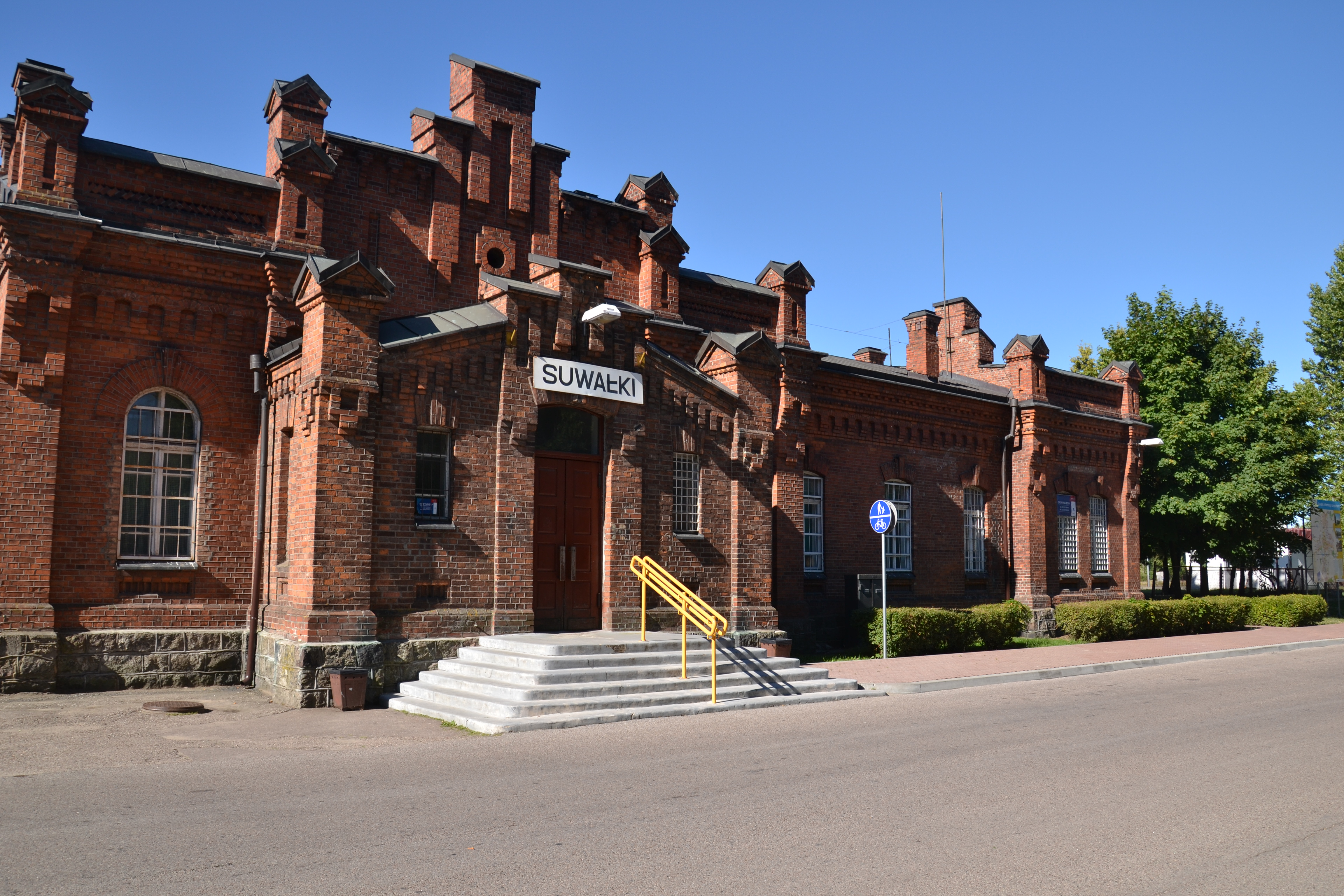 Widok dworca w Suwałkach od strony miasta This photo was taken during Railway Wikiexpedition 2015 set up by Wikimedia Polska Association in cooperation with Fundacja Grupy PKP. You can see all photographs in category Wikiekspedycja kolejowa 2015.